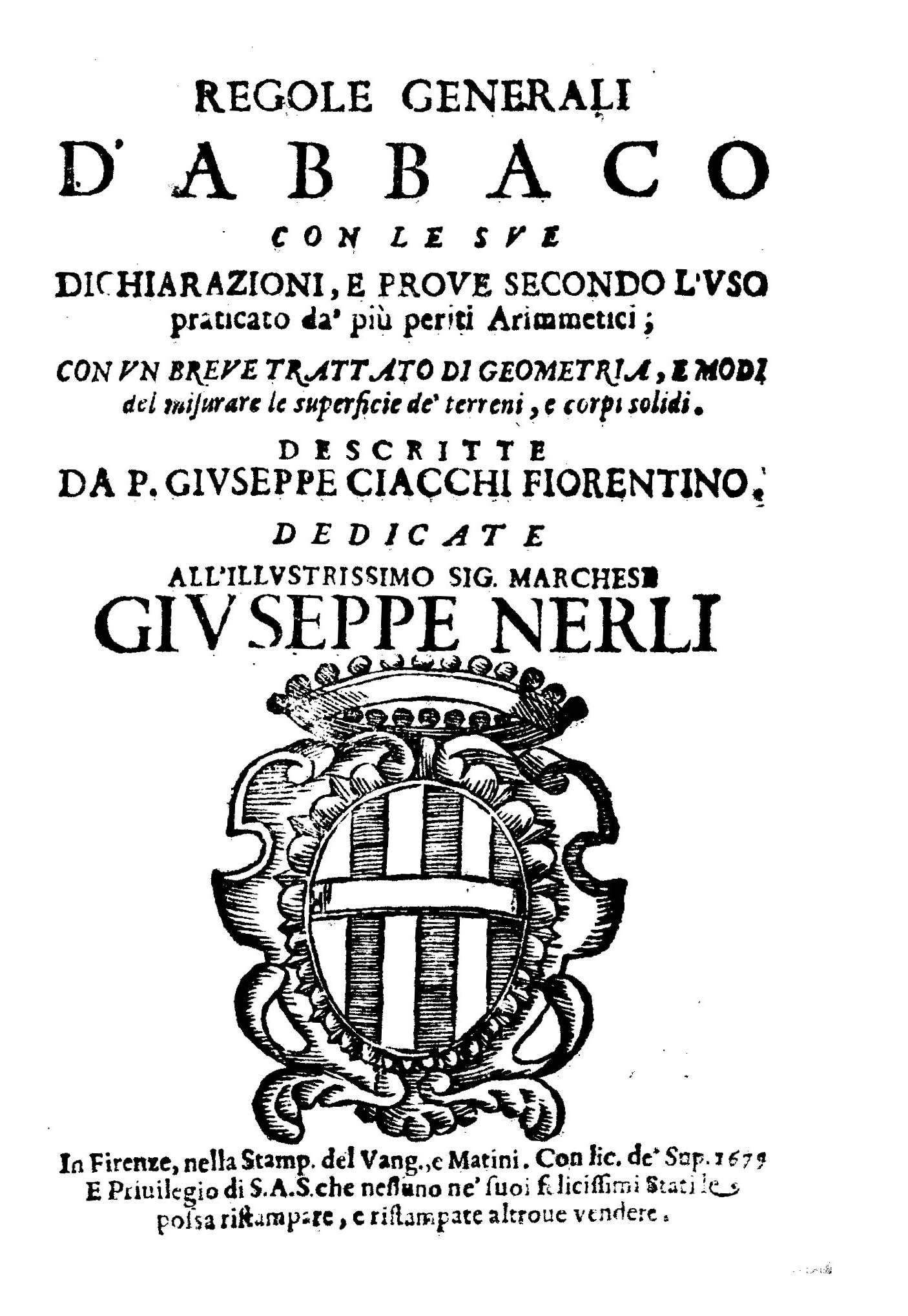 Regole generali d'abbaco con le sue dichiarazioni, e proue secondo l'vso praticato da' piu periti arimmetici; con vn breue trattato di geometria, e modi del misurare le superficie de' terreni, e corpi solidi. Descritte da p. Giuseppe Ciacchi fiorentino. Dedicate all'illustrissimo ... Giuseppe Nerli. - In Firenze : nella stamp. del Vang., e Matini, 1679. - [16], 398, [2] p. : ill. ; 8º .